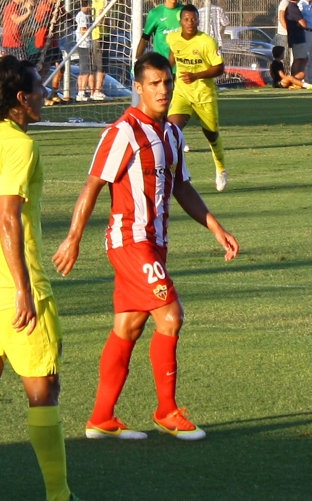 Fotografía de Rafita, jugador de la U.D. Almería